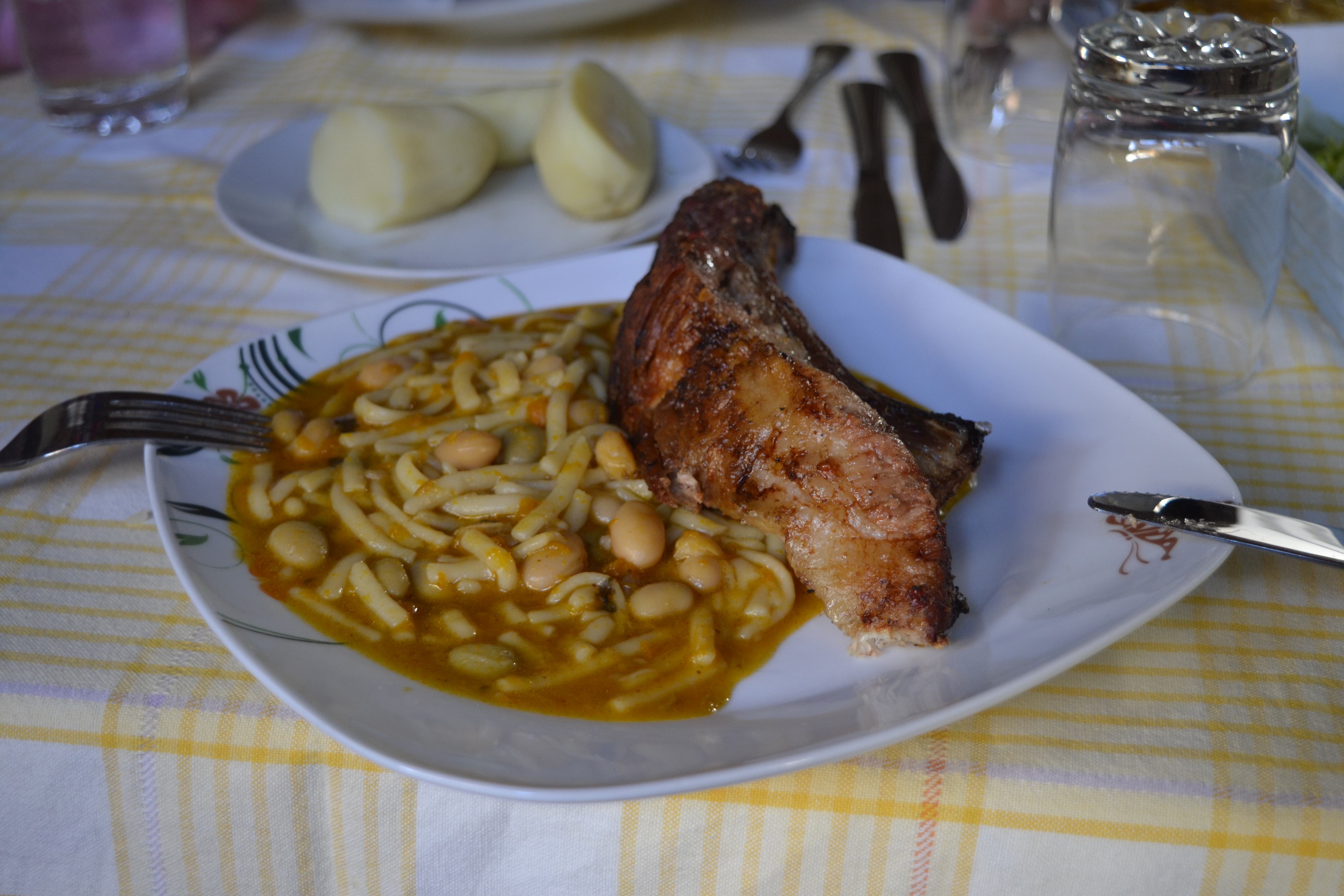 Porotos con rienda y un trozo de chancho asado, acompañado con unas papas cocidas. Lindo 18 de Septiembre 2015, en familia.